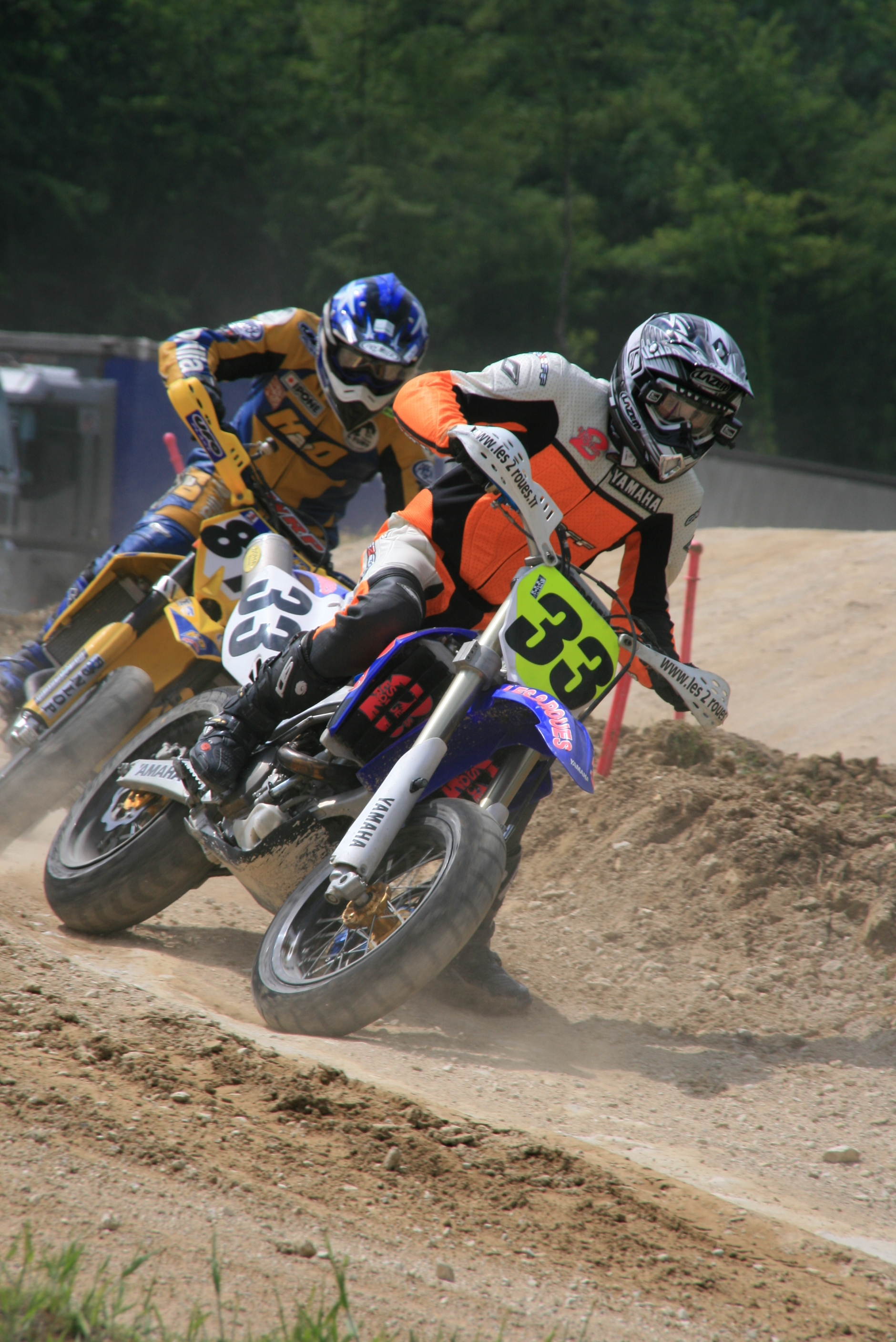 2007/6/3 France Villers sous Ecotにて撮影